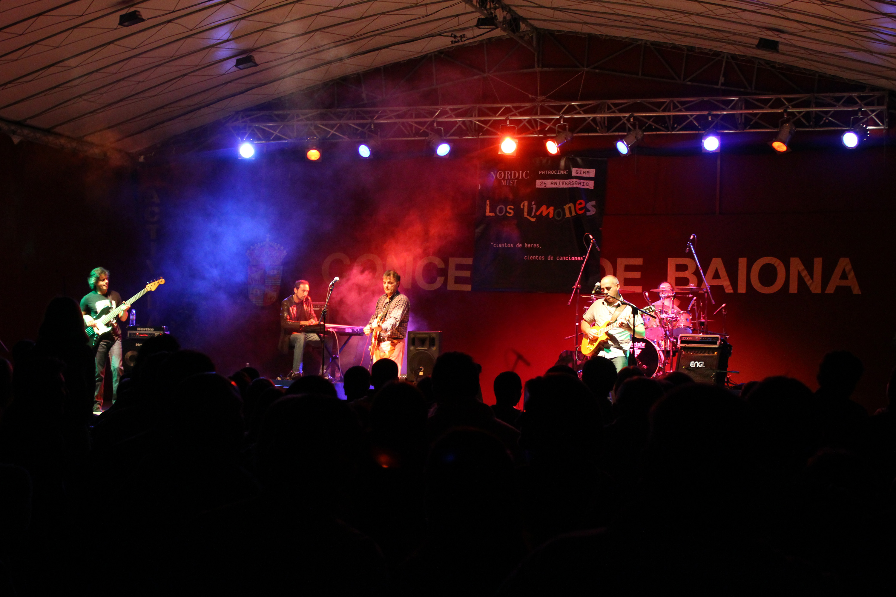 Concierto de Los Limones en Bayona (Pontevedra) el 18 de agosto de 2012.